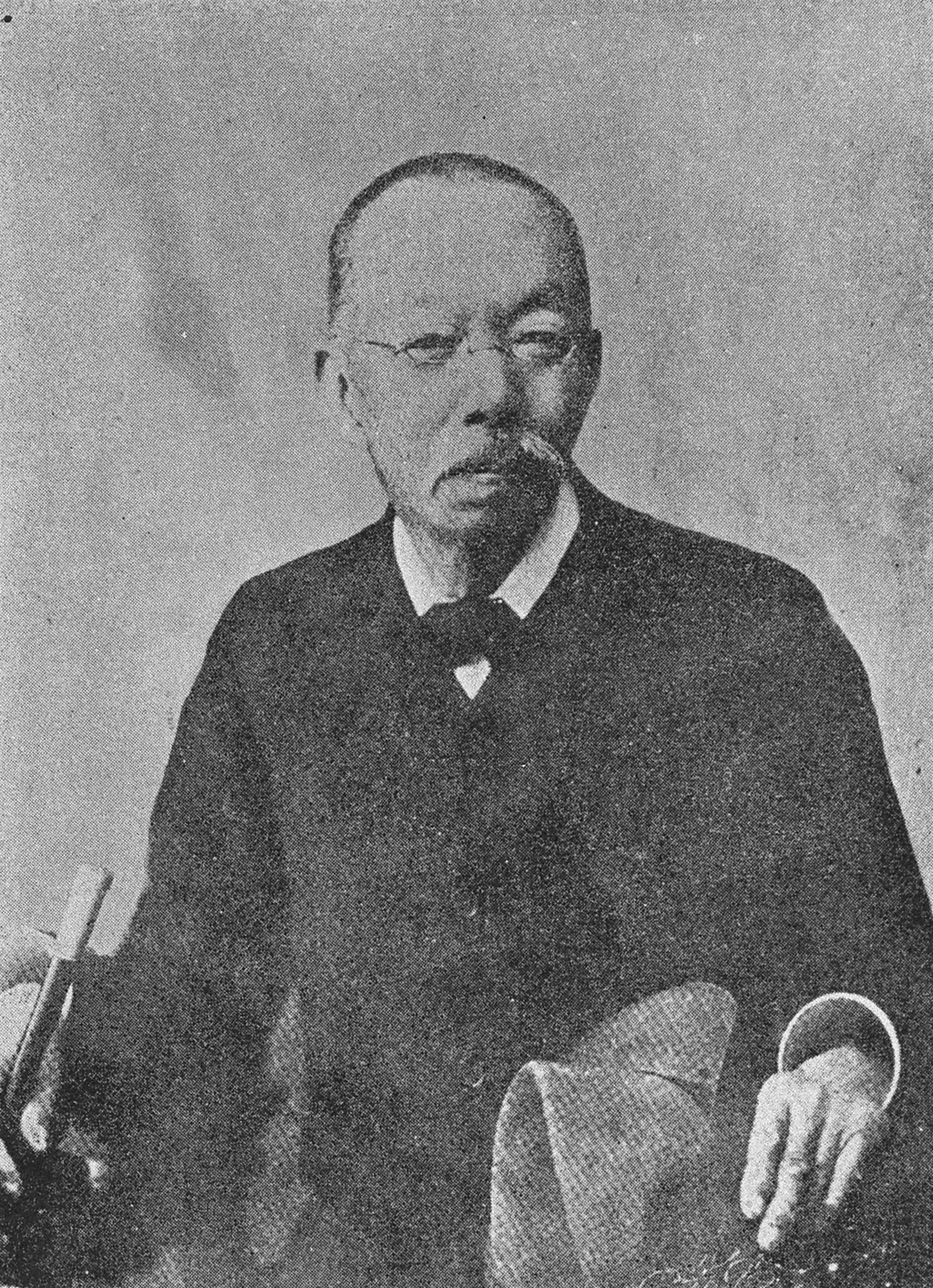 Portrait of Takagi Saburo (高木三郎, 1841 – 1909)